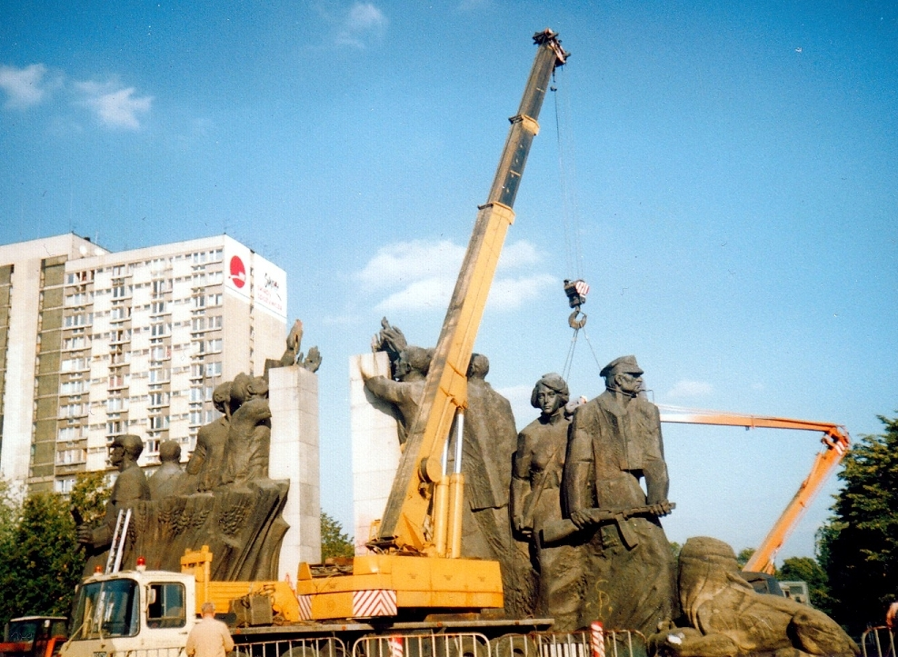 Warszawa - Pomnik Poległym w Służbie i Obronie Polski Ludowej, zdjęcie z demontażu pomnika w 1991